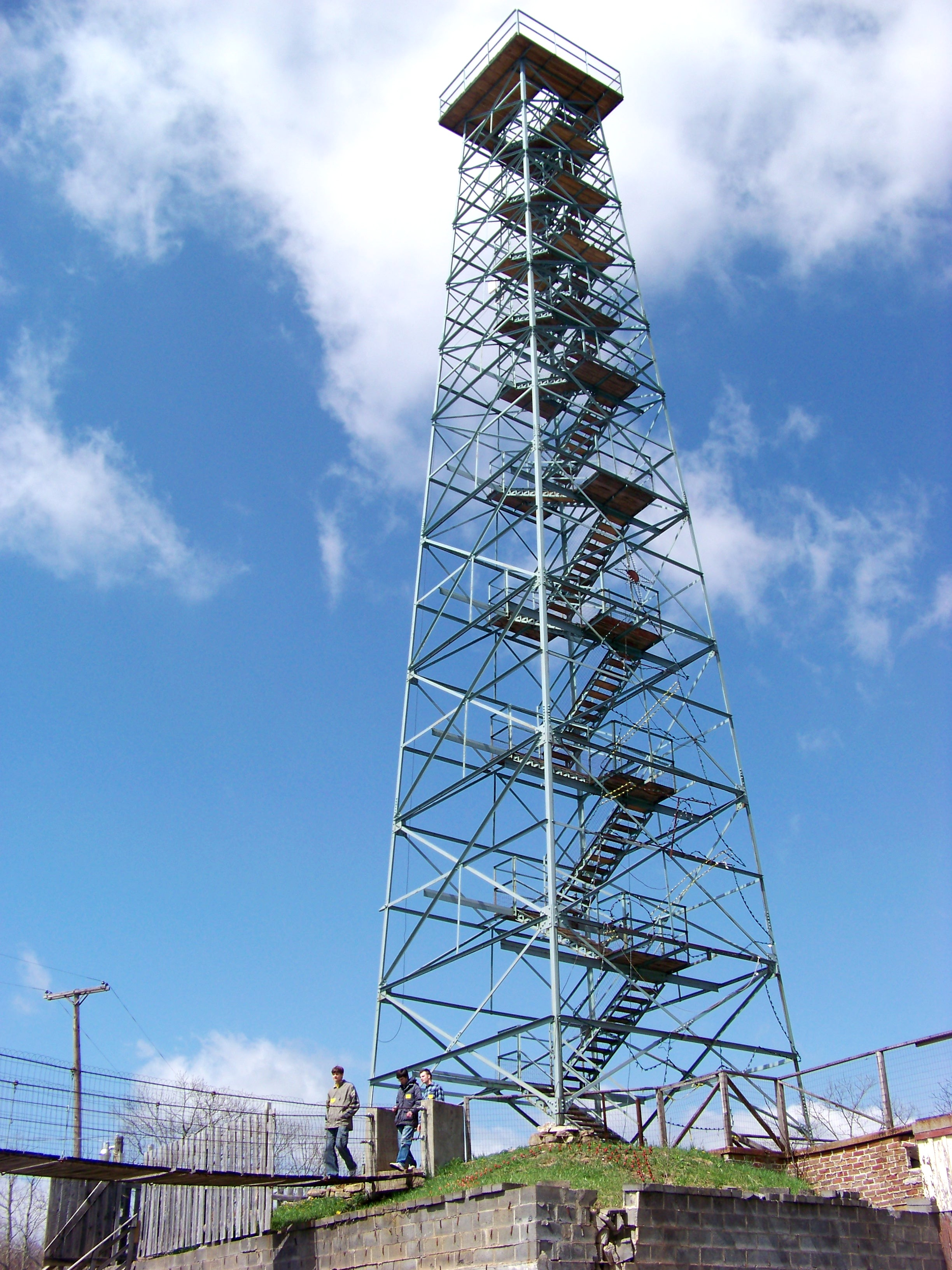 Big Walker Mountain Fire Tower